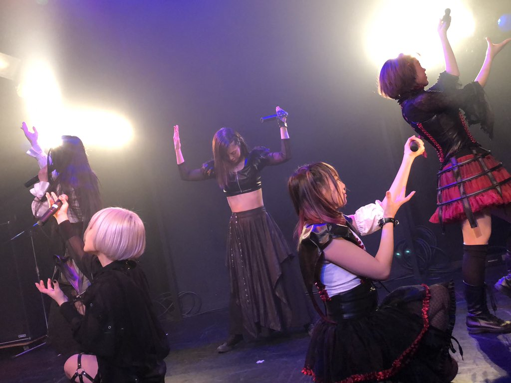 ネクロノマイドル：渋谷CHELSEA HOTELでのライブ(2019.2.11)